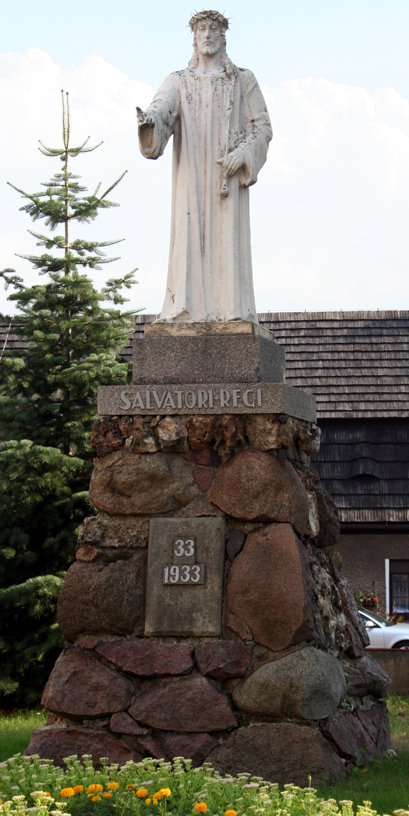 figura Chrystusa przy kościele św. Jakuba Starszego Apostoła w Lubszy, gmina Woźniki, powiat lubliniecki